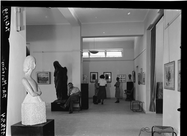 מוזיאון תל אביב, מראה כללי של אחד מאולמות התצוגה. בחזית התצלום, משמאל: פסל מאת חנה אורלוף.